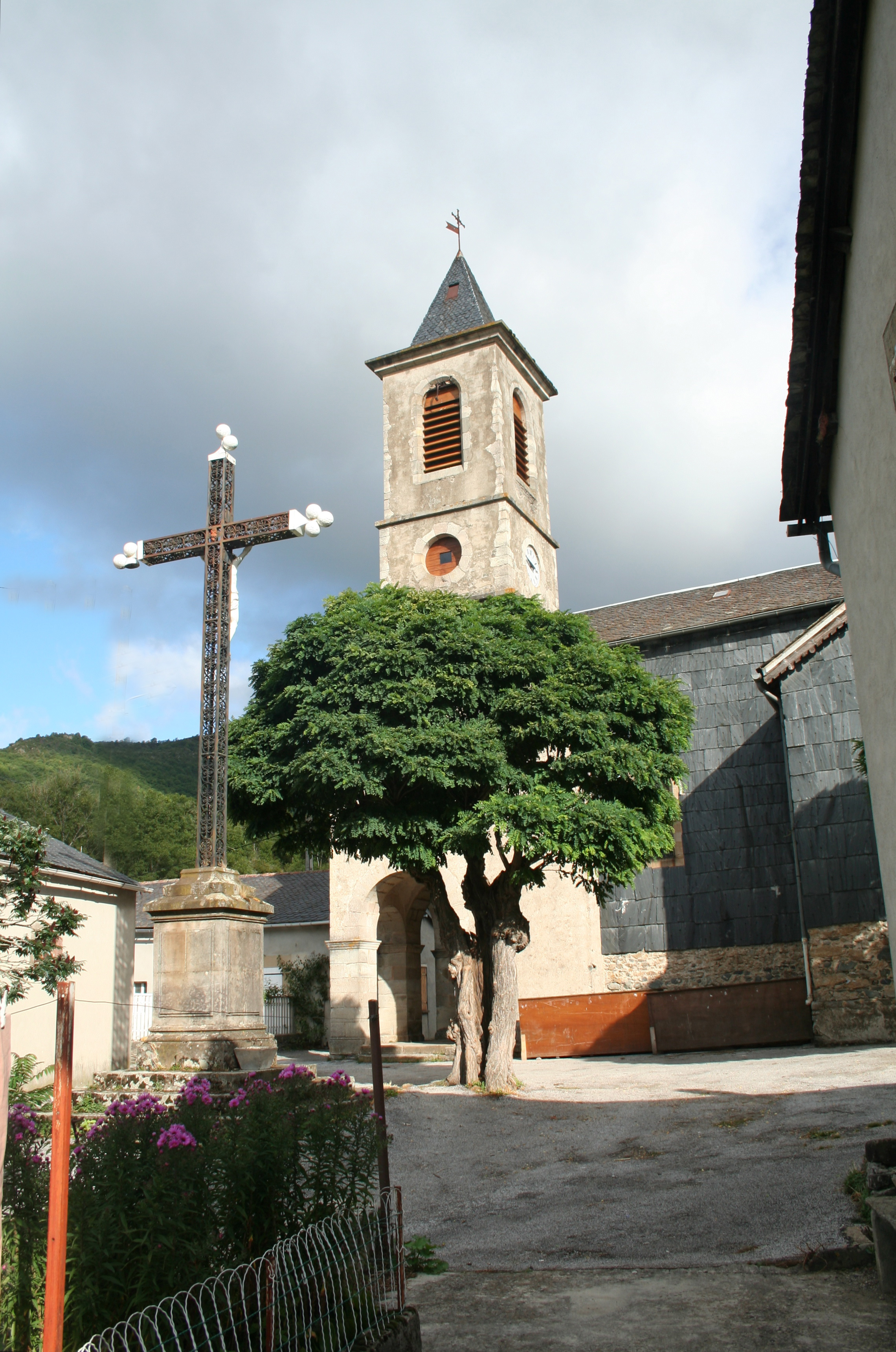 Arnac-sur-Dourdou (Aveyron) - Église Saint-Benoit.